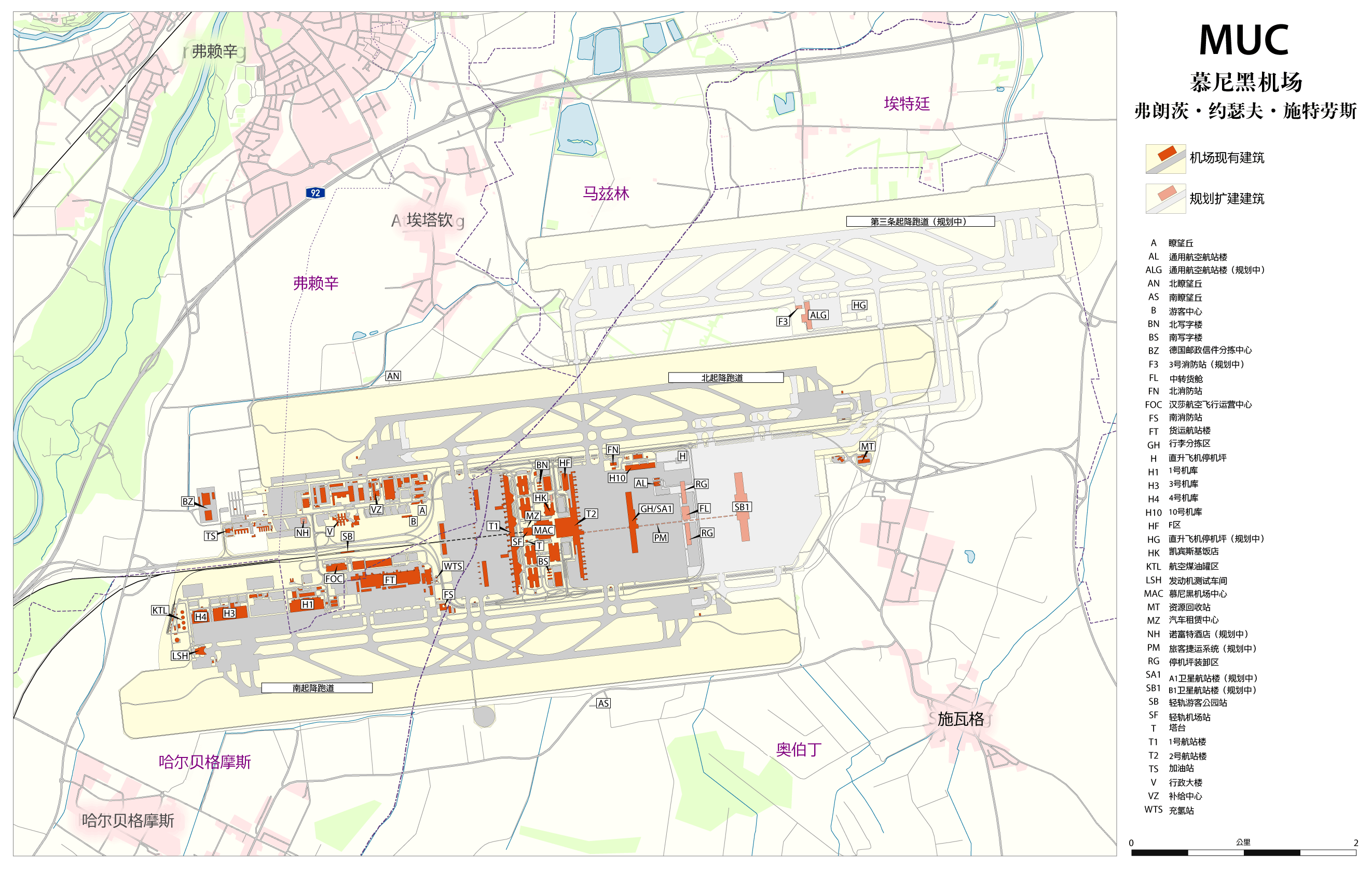 Karte vom Flughafen München inkl. geplanter Erweiterungen